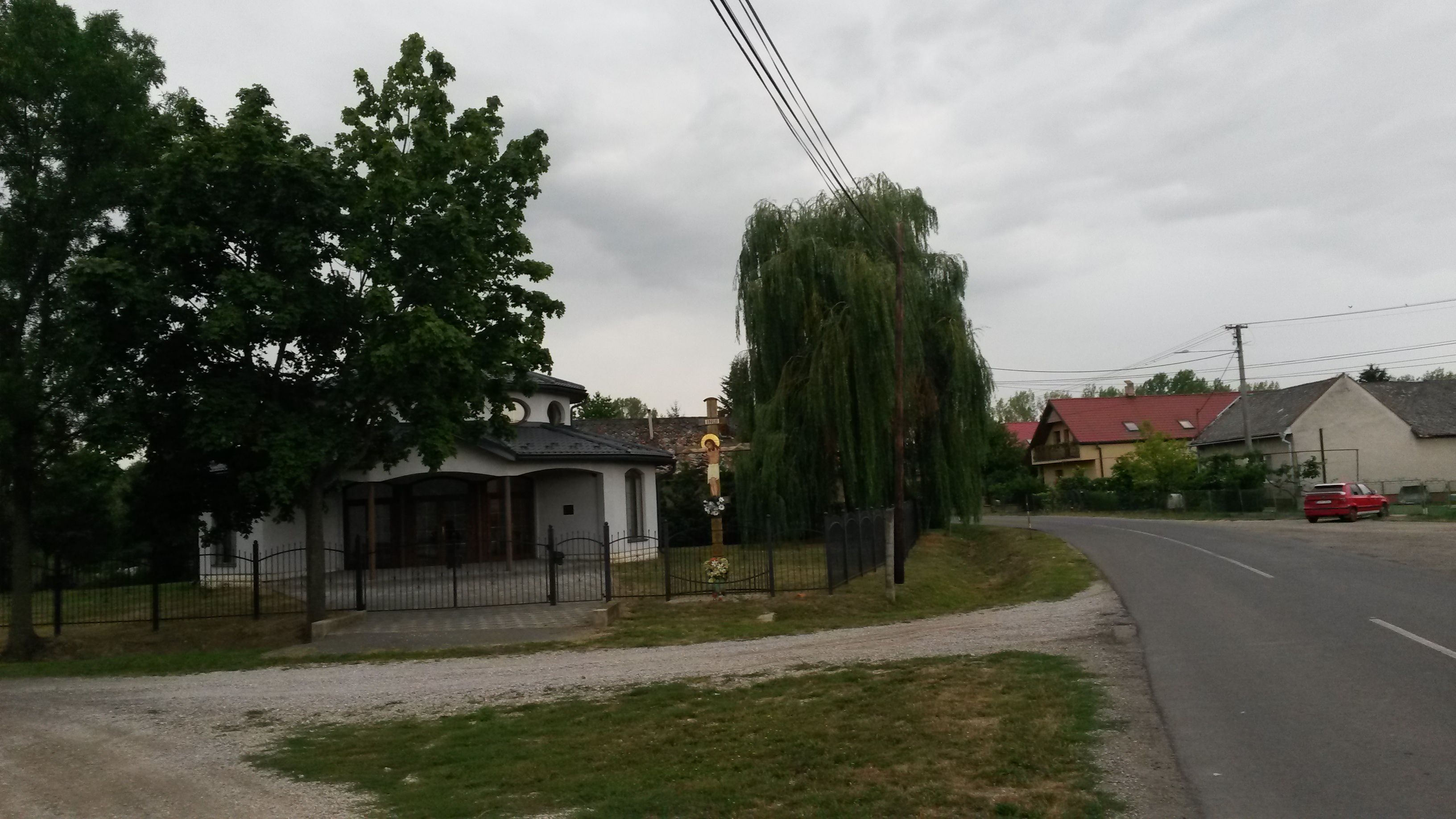 Bunkovce, dom smútku